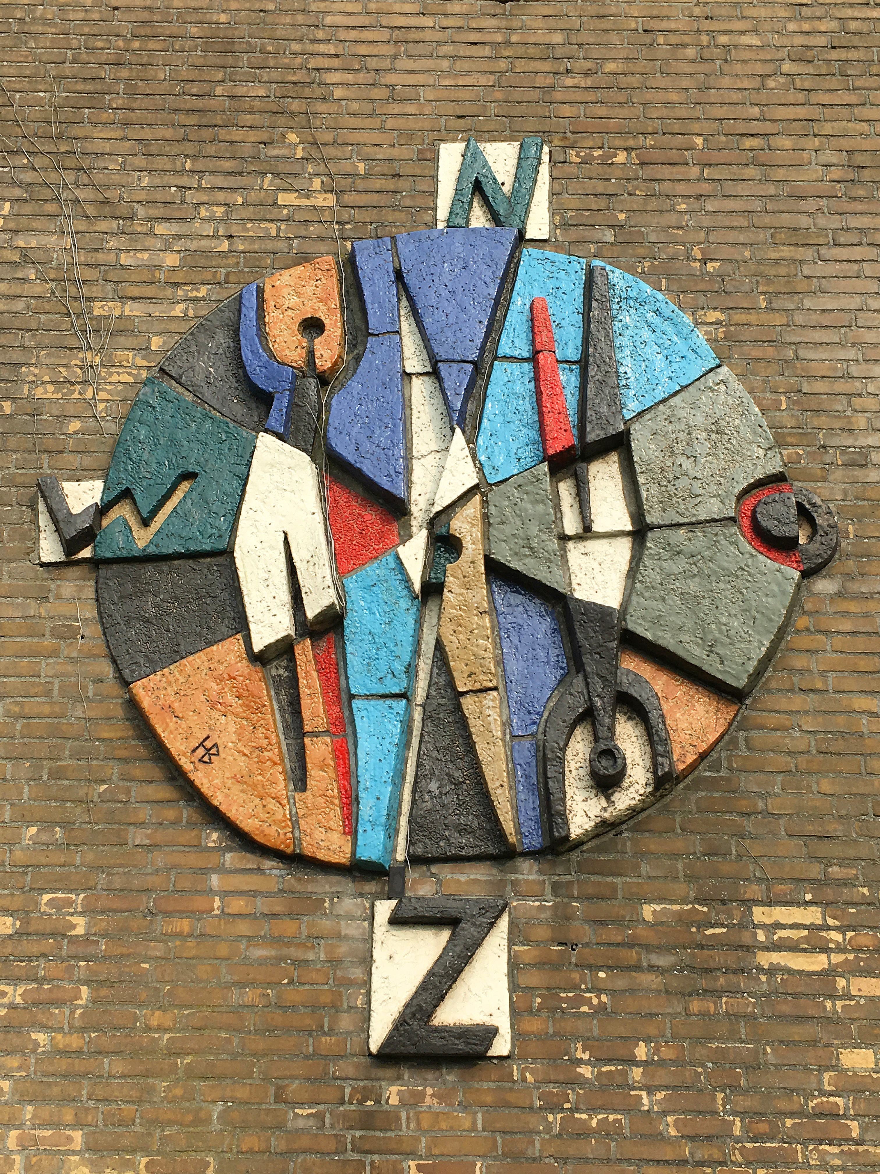 Mozaïek Hugo Brouwer, Valkenswaard. Foto: Hidde Dijkstra